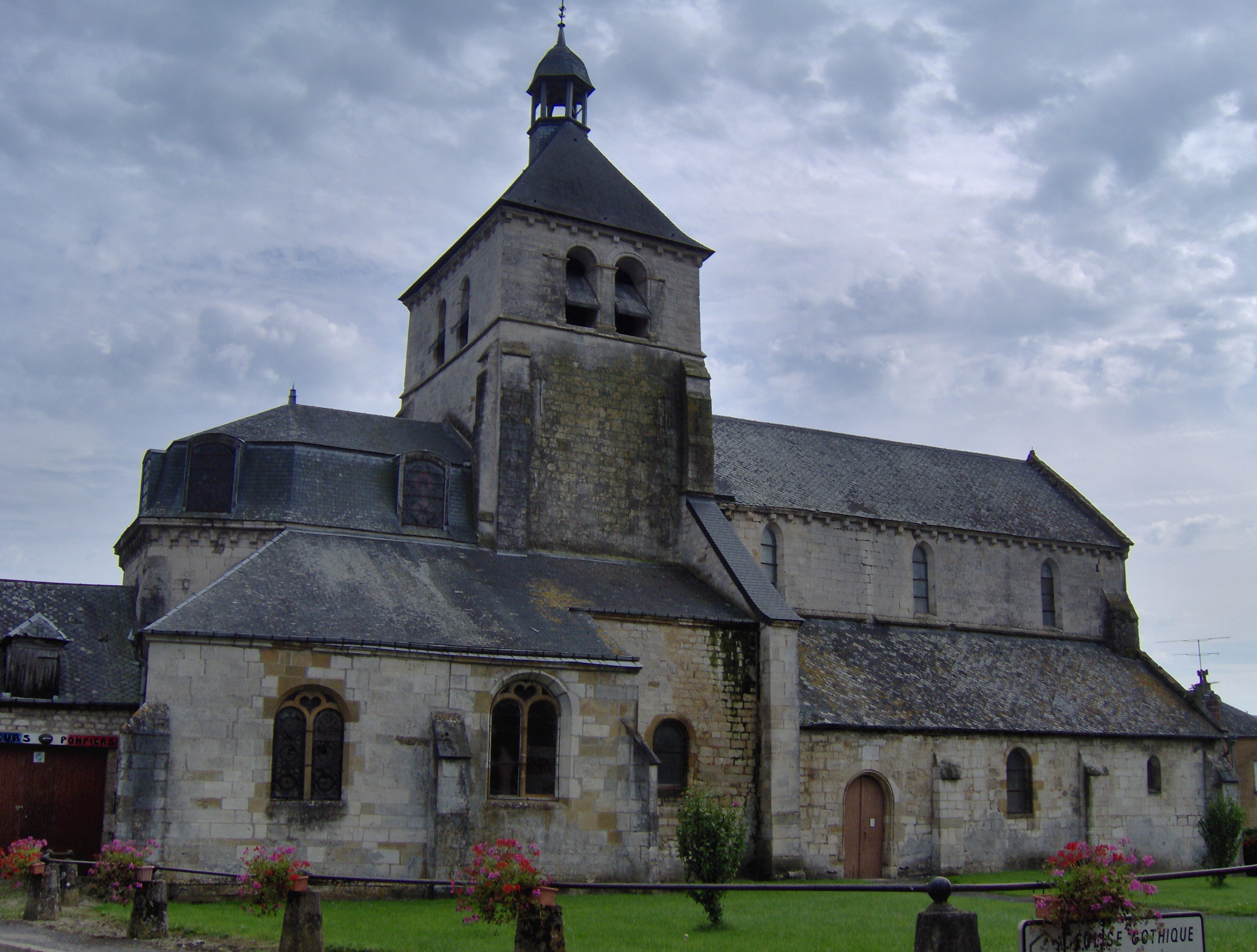 Eglise de Vendresse, Ardennes, France